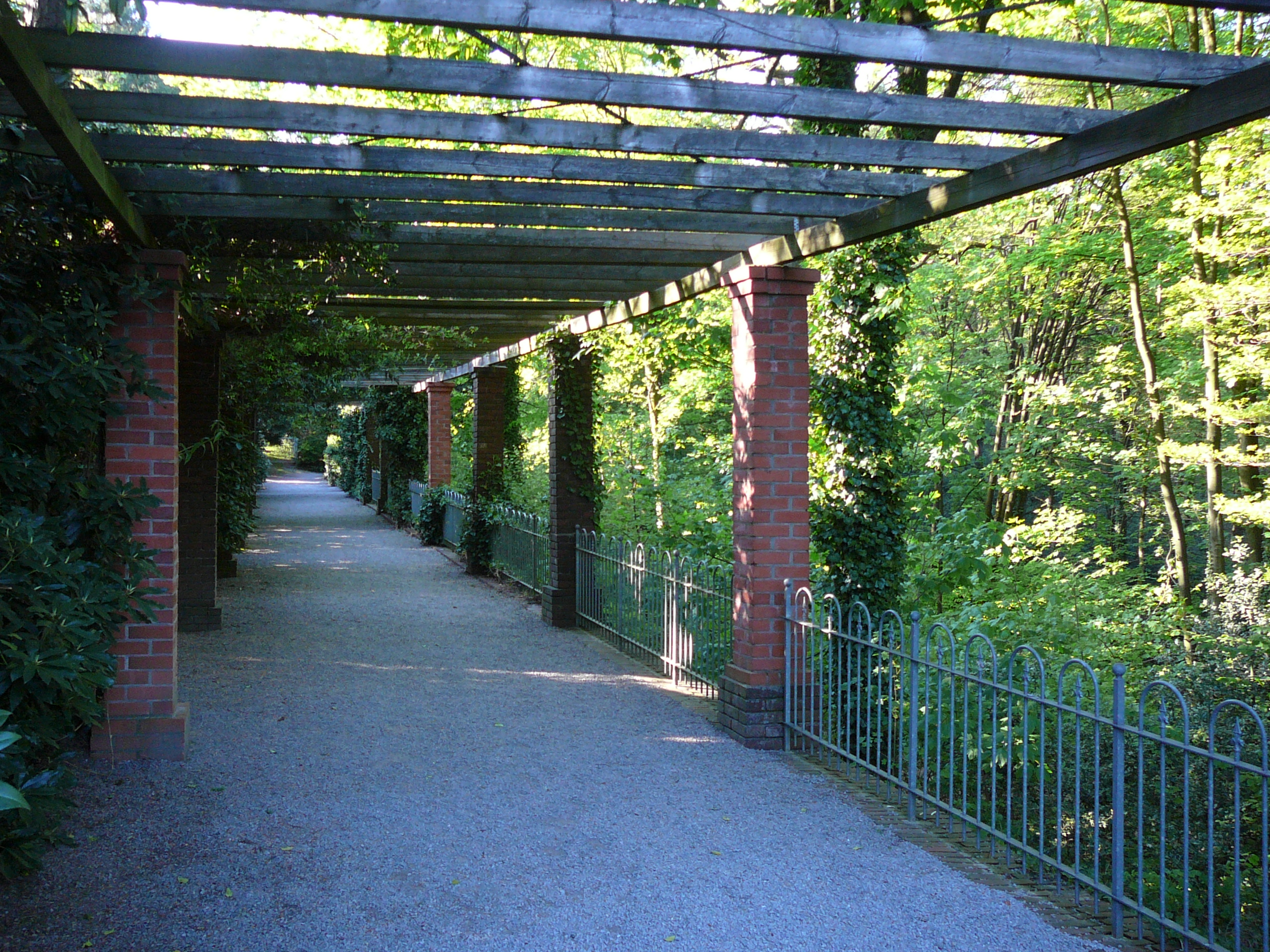 Adolf-Vorwerk-Straße, Wuppertal